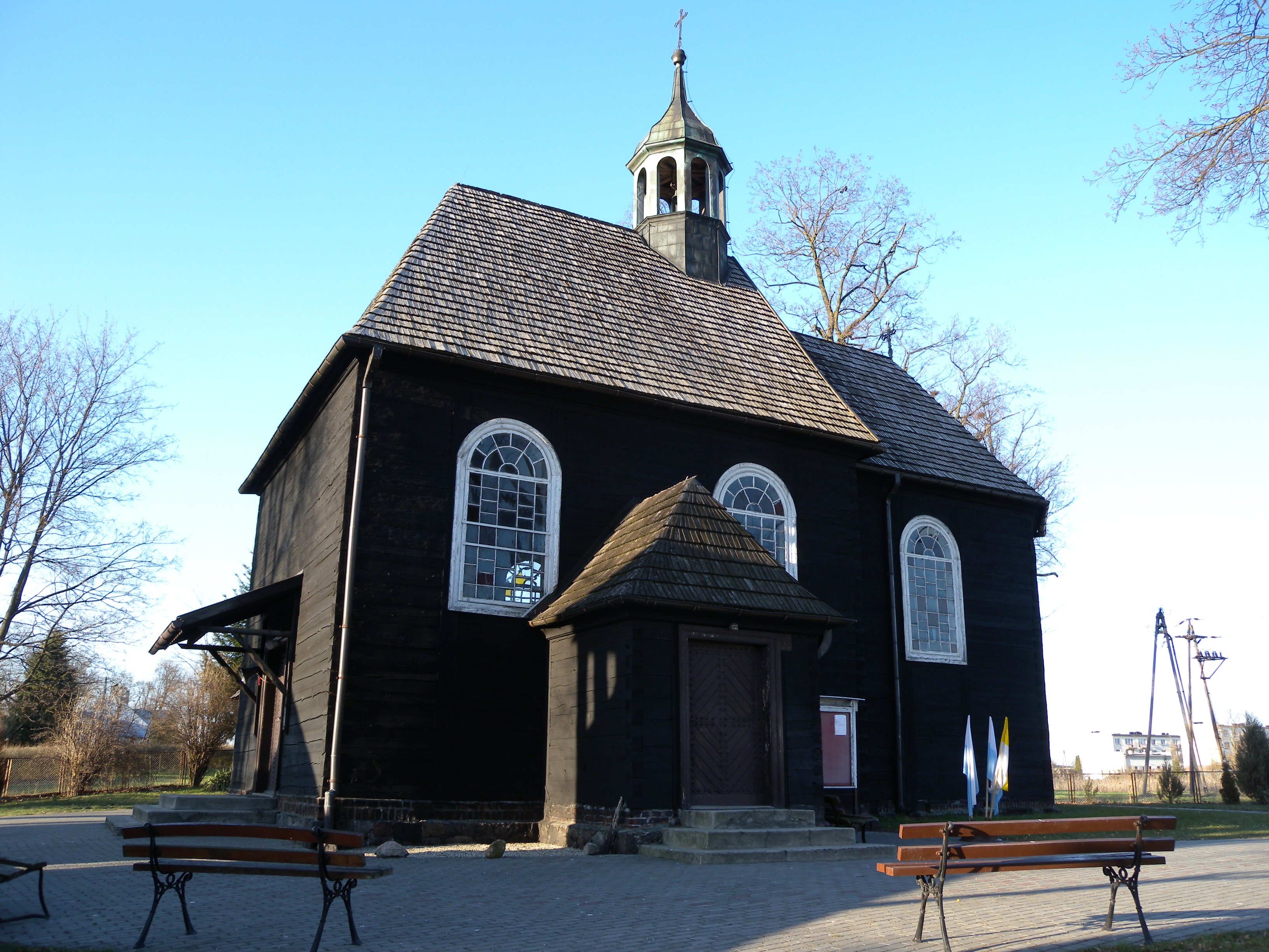 Kościół pw. Zwiastowania NMP